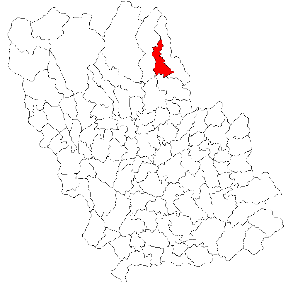 Categorie:Hărţi ale judeţului Prahova